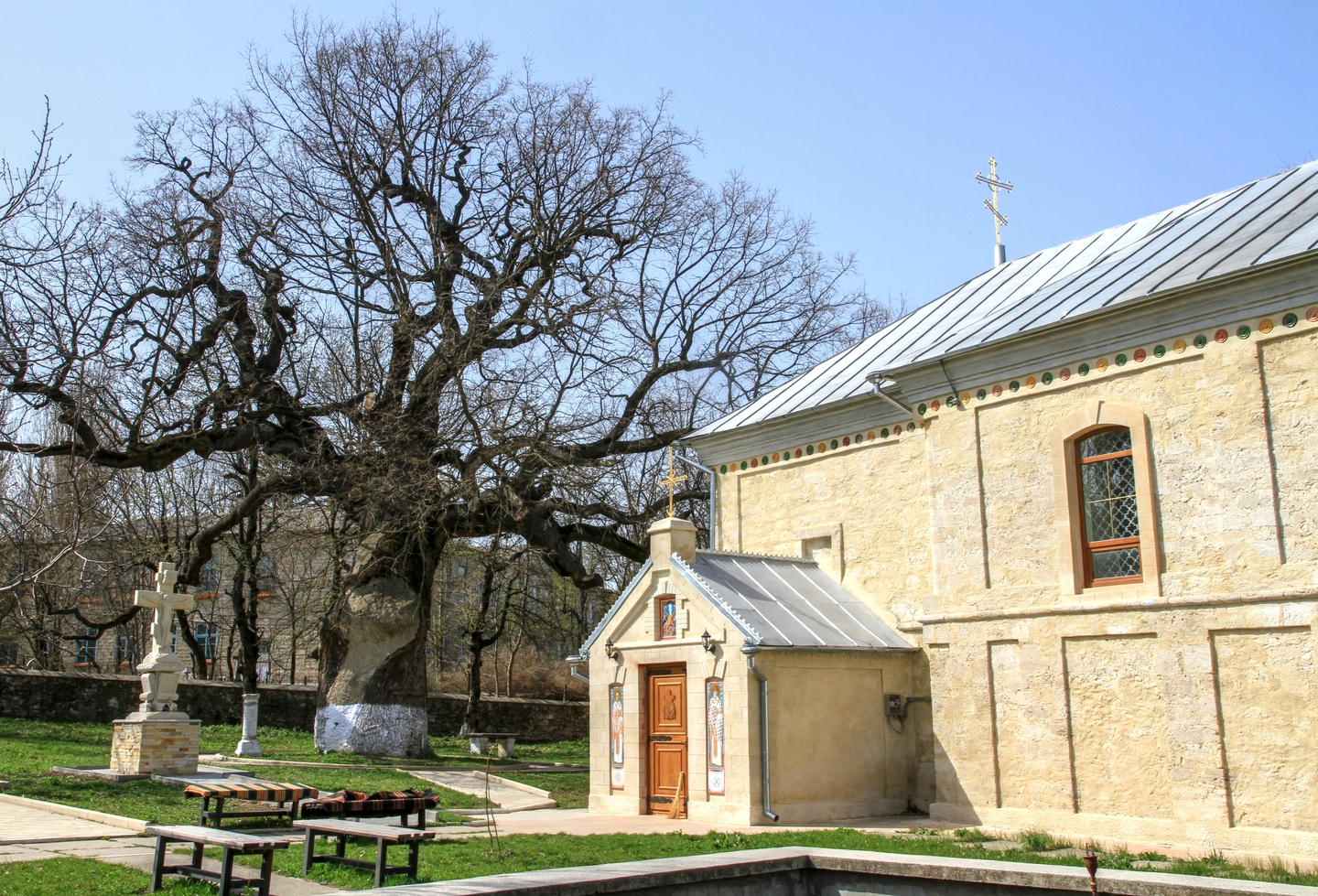 Дуб черешчатый «Штефан чел Маре», монумент природы, находится в Шолдэнештский район, с. Кобыля (код MD-SD-mn.Cb-103) Cb-103